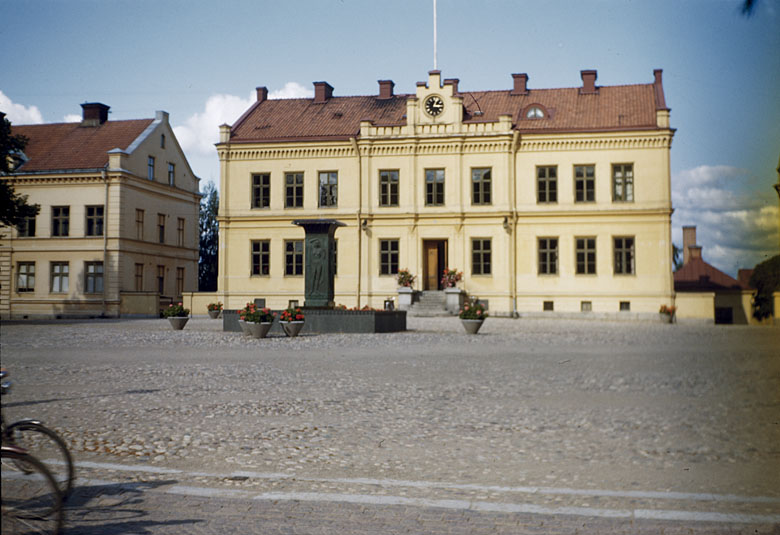 Torget i Strängnäs Motiv: Strängnäs Nyckelord: Riksintressen Kategori: Stadsmiljö, TorgmiljöTorget i Strängnäs.